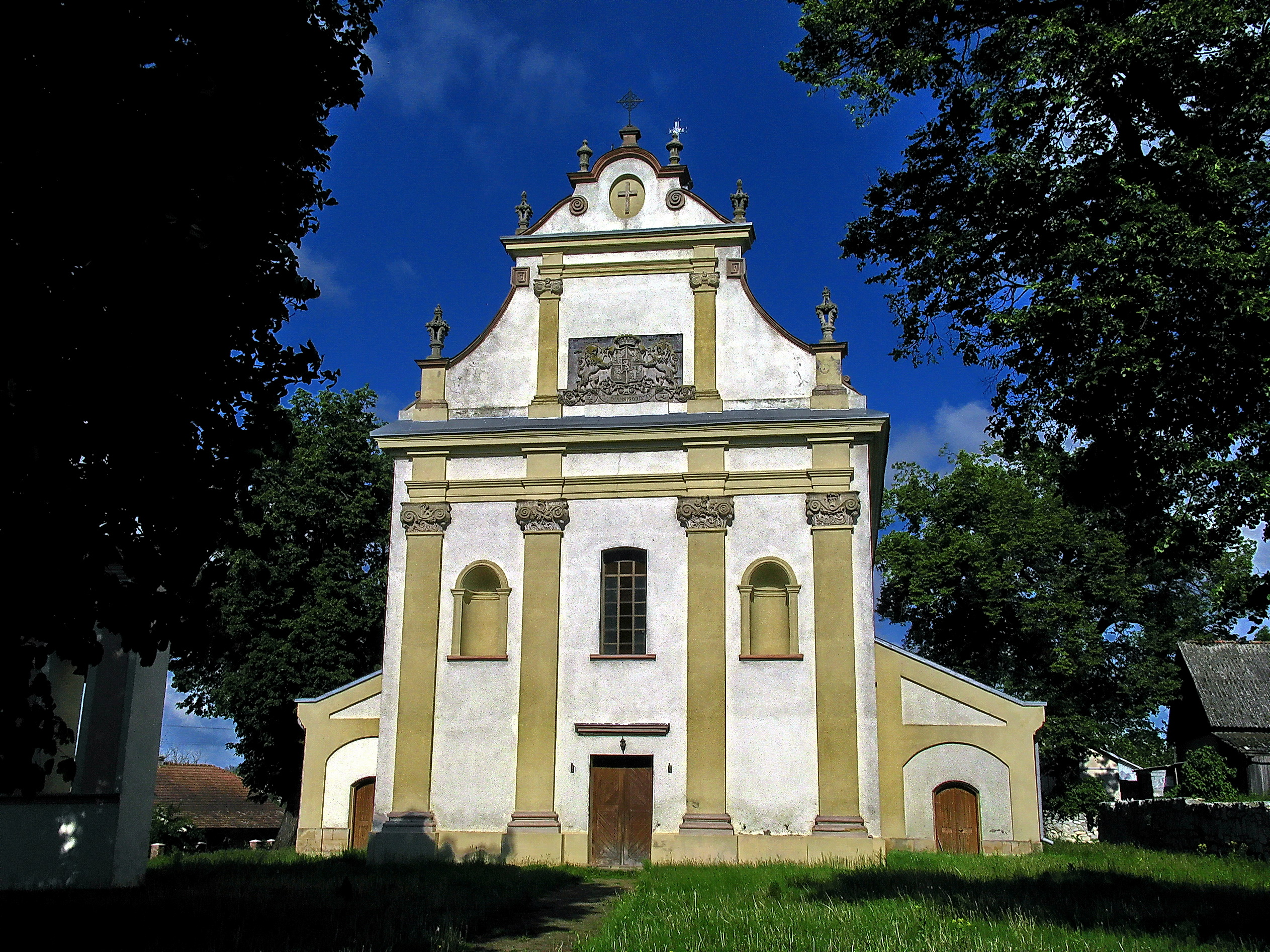 Костел (мур.), Ягільниця